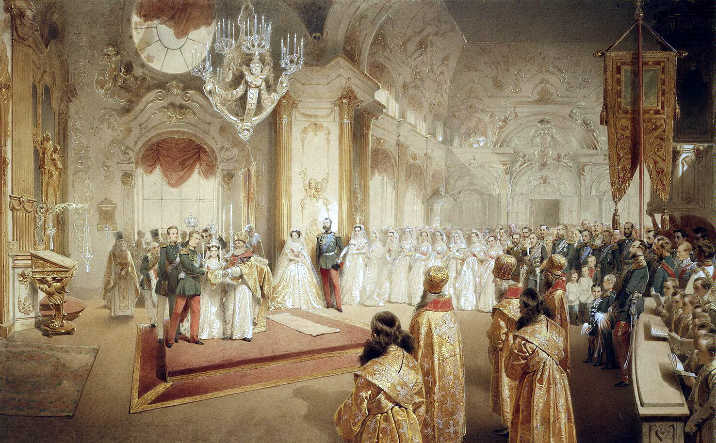 Зичи, Михай - Свадьба великого князя Александра Александровича и великой княгини Марии Федоровны Внизу справа подпись и дата: Zichy 1867 Коричневая бумага; акварель, гуашь, белила; наклеен на паспарту. 450 х 722 Происхождение: пост, в 1919 из Аничкова дворца Инв. № ОР-27190 Выставки: 1977-1978 Budapest Литература: Алешина 1975, с. 201 Бракосочетание великого князя Александра Александровича и великой княгини Марии Федоровны состоялось 28 октября 1866 г. в Соборе Зимнего дворца. В композиции несколько последовательных эпизодов бракосочетания. Слева: протопресвитор Бажанов совершает акт венчания, младший брат цесаревича Владимир держит над ним корону, а наследный датский принц Фредерик держит корону над головой сестры; рядом великий князь Алексей Александрович и князь Николай Максимилианович – герцог Лейхтенбергский. В центральной части листа Александр II и императрица Мария Александровна. Правее, в нижней части листа, изображены придворные дамы, члены Синода, хор певчих-мальчиков. В честь невесты и ее датских родственников император, великие князья, наследные принцы, генералы в мундирах с перекинутой через правое плечо голубой лентой (отличительный знак датской формы).